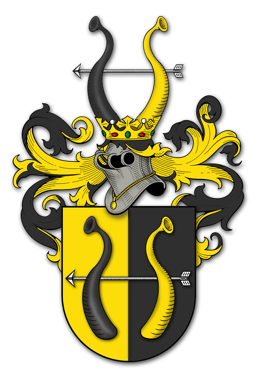 Brasão Paternoster do Trentino. As cores originais haviam sido perdidas e reconstruídas pelo ramo brasileiro como vermelho e branco, mas foram descobertas em 2019.